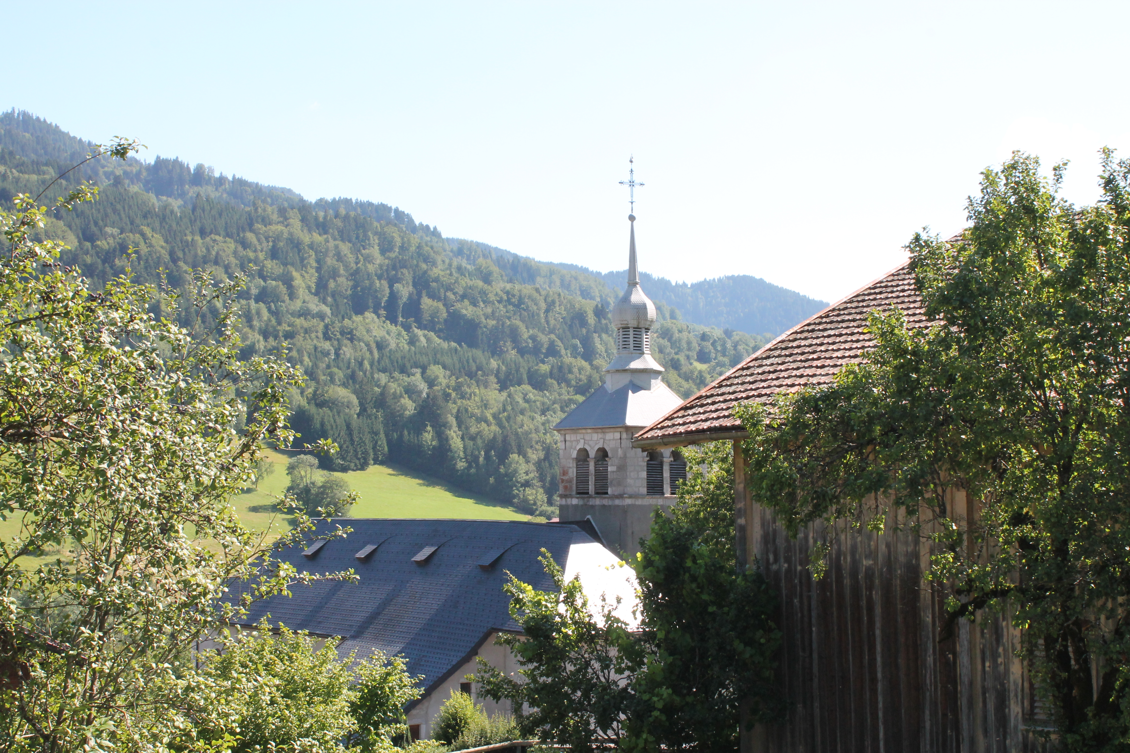 Église Saint-Laurent des Villards-sur-Thônes (XVIIIe siècle)